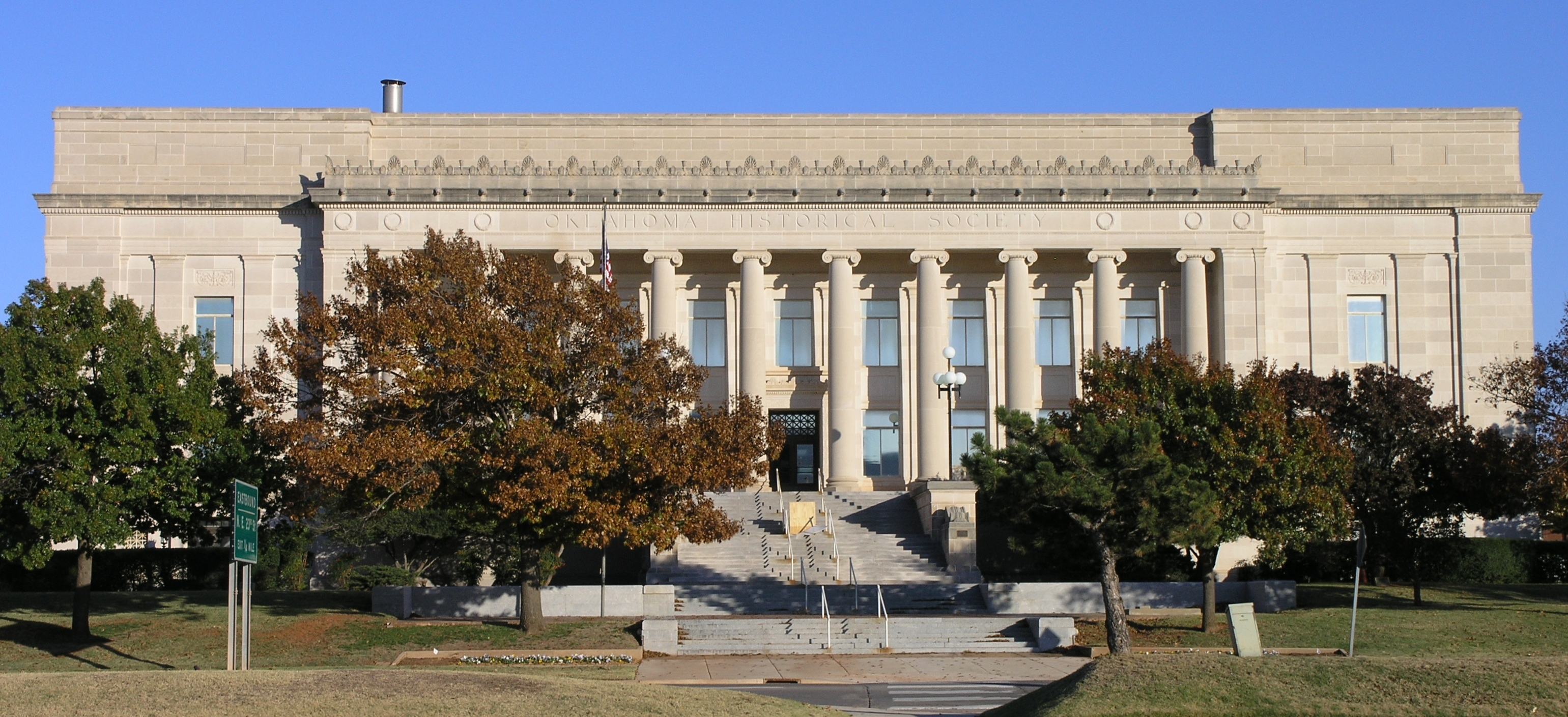 Oklahoma City